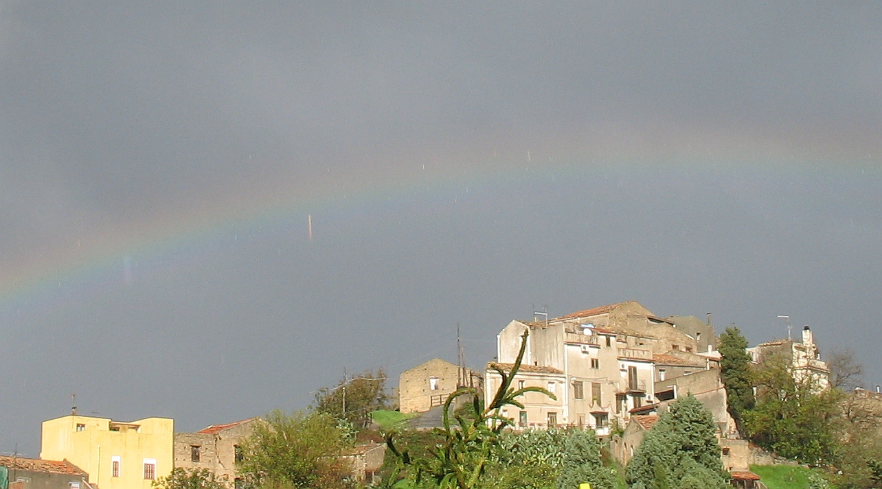 Rometta - local. Portaro